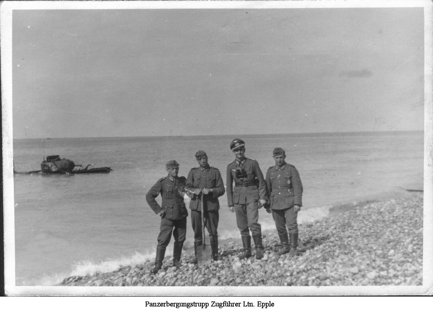 Panzerbergungstrupp PzPiBatt.49 10.PD Zerstörte britische Panzer werden am Strand von Dieppe geborgen